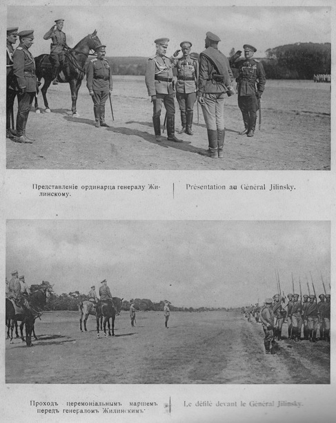 Русский экспедиционный корпус. Фотоальбом. Описание - на фотографии